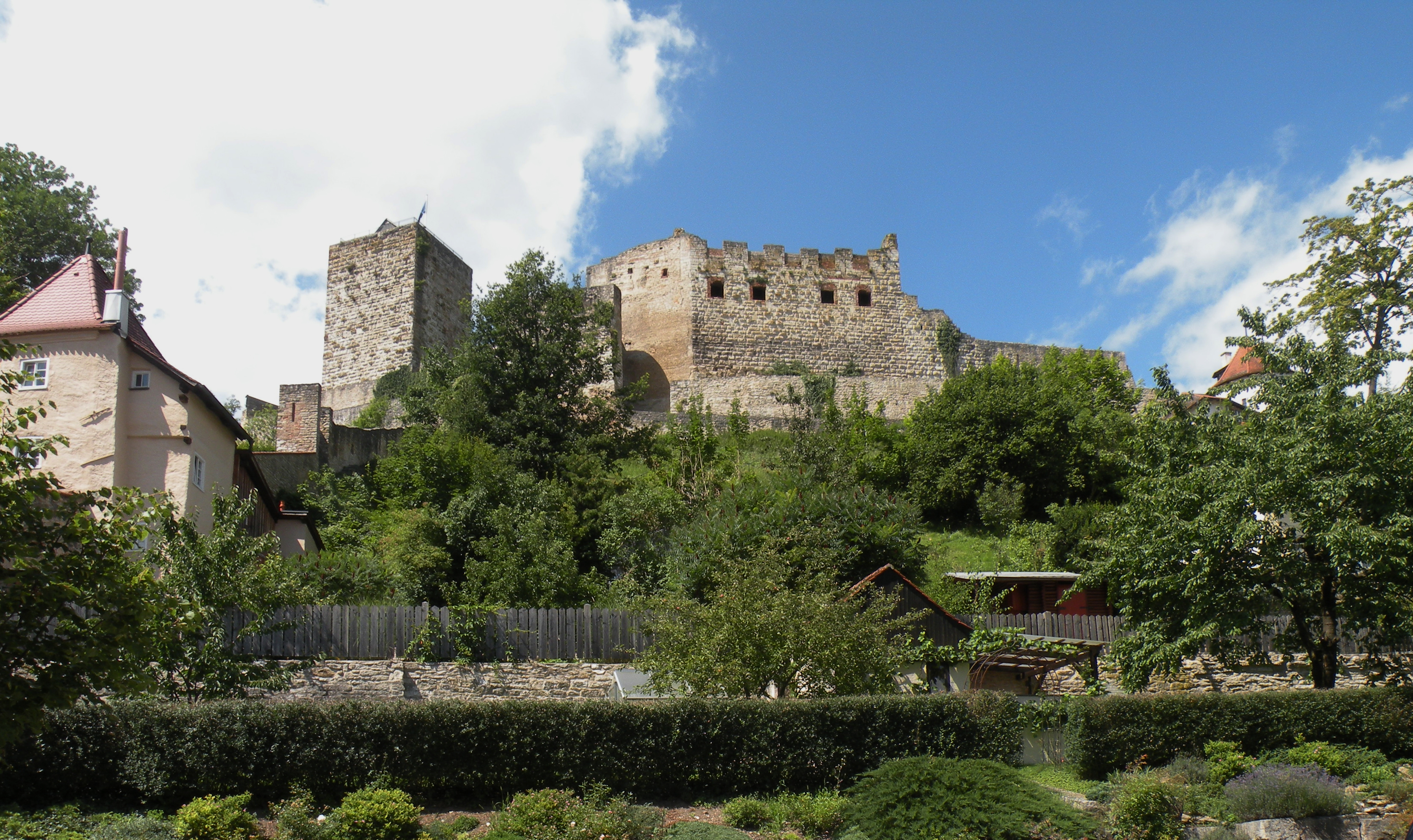 Pappenheim_Castle